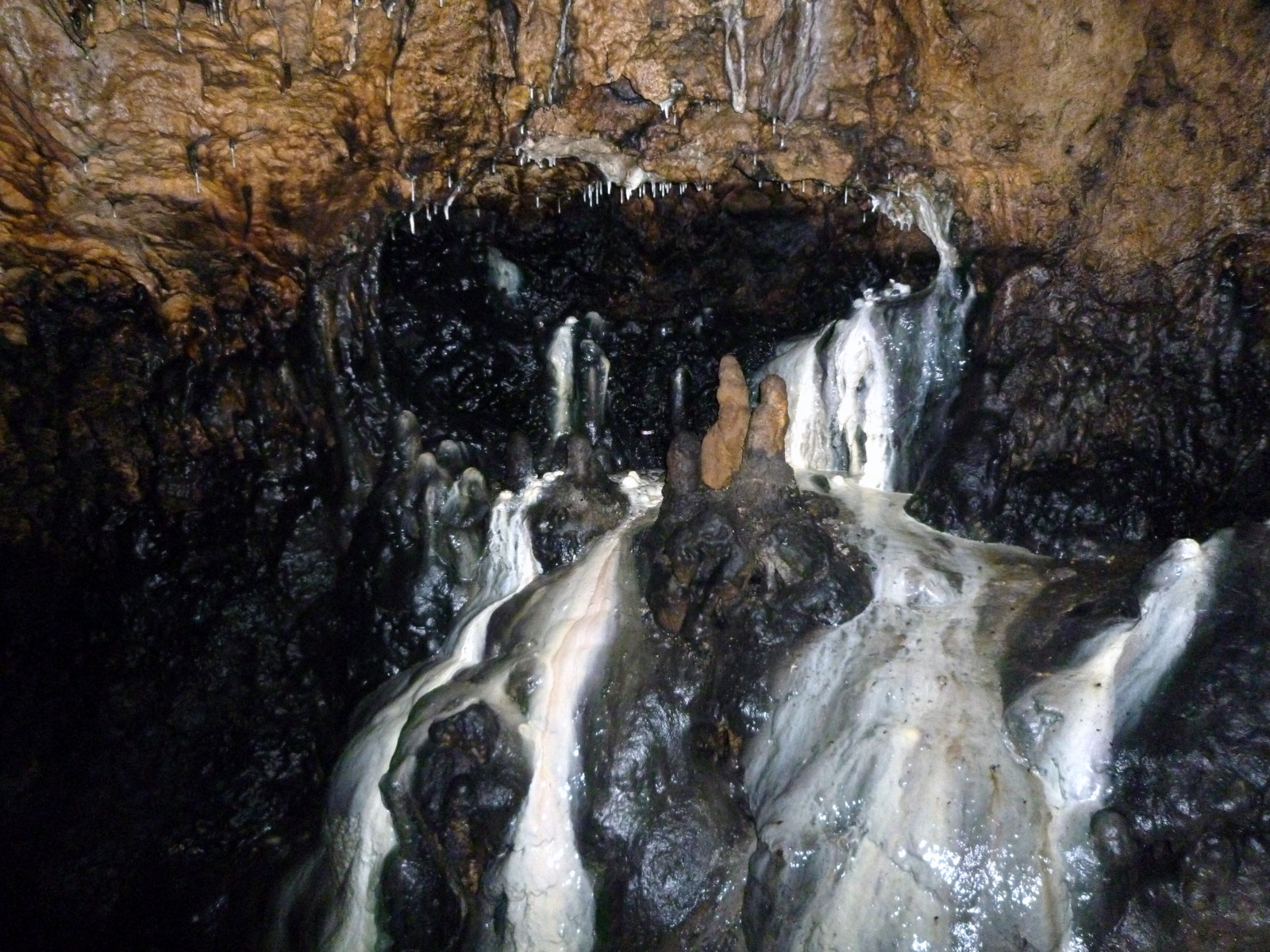 Osterhöhle